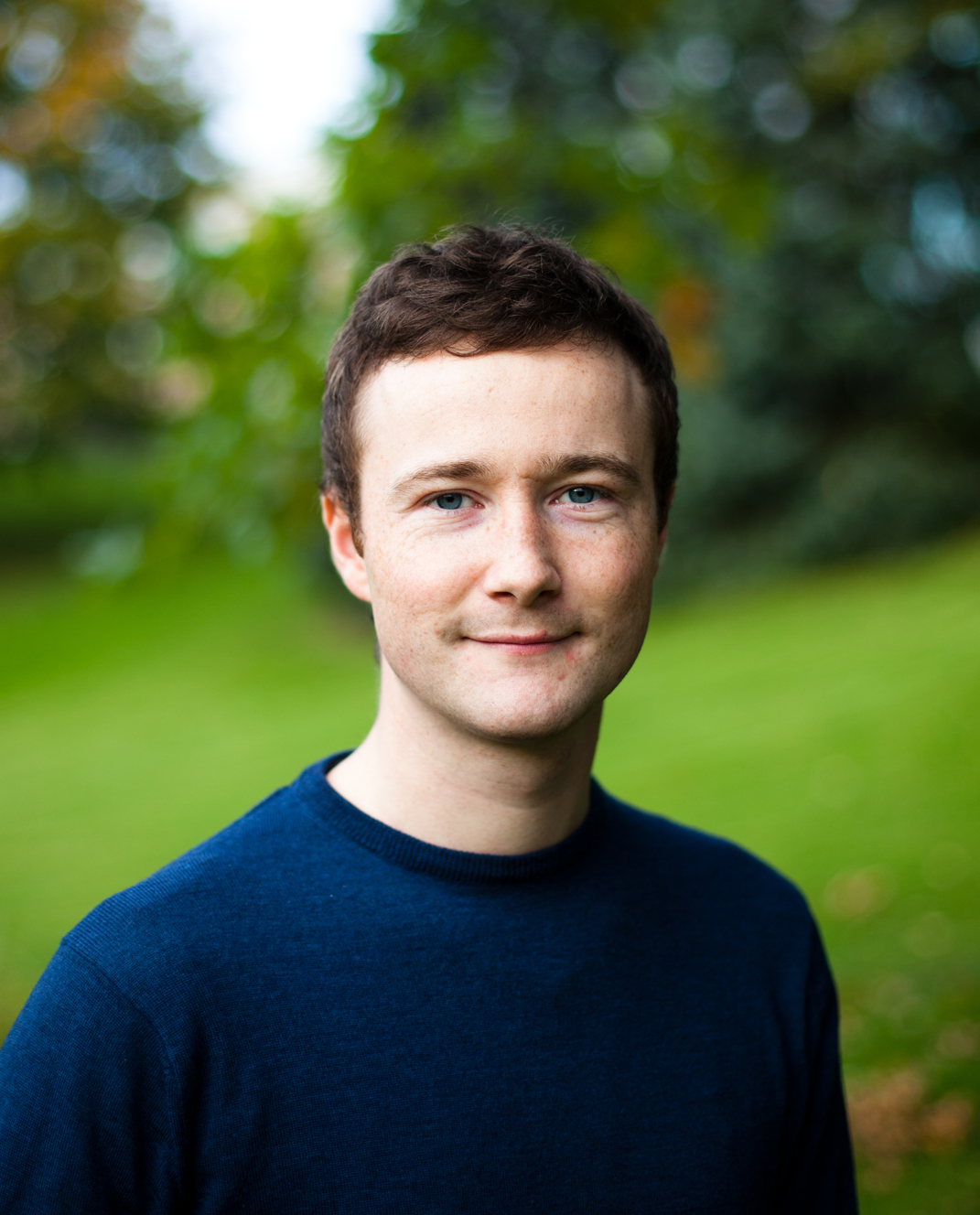 Erling Emil Laugsand